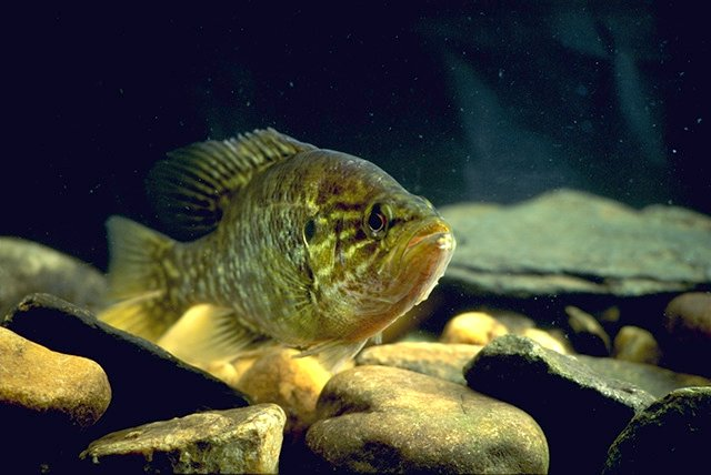 Chaenobryttus gulosus syn. Lepomis gulosus